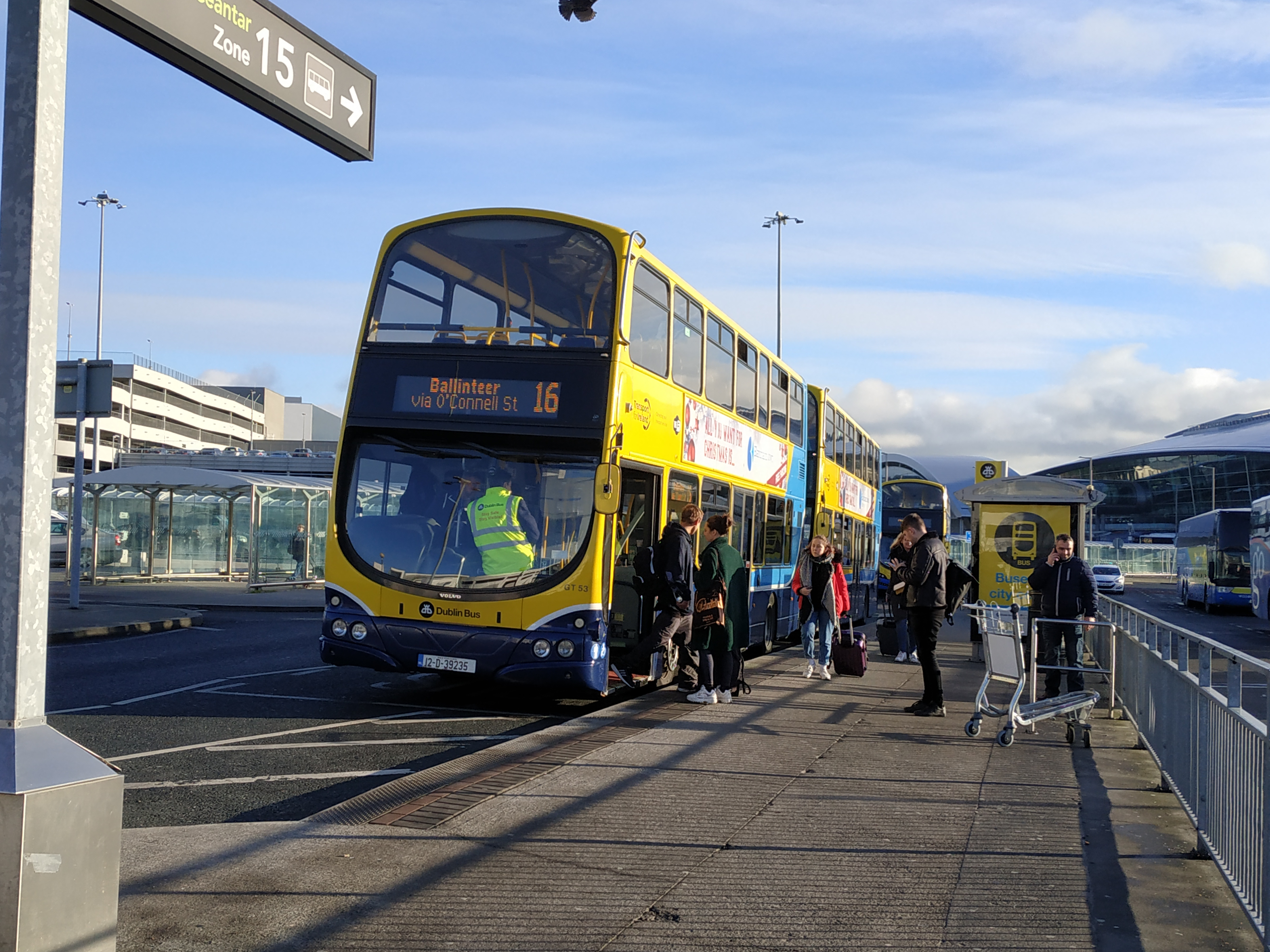 Dublin bus, ligne 16 desservant l'aéroport de Dublin